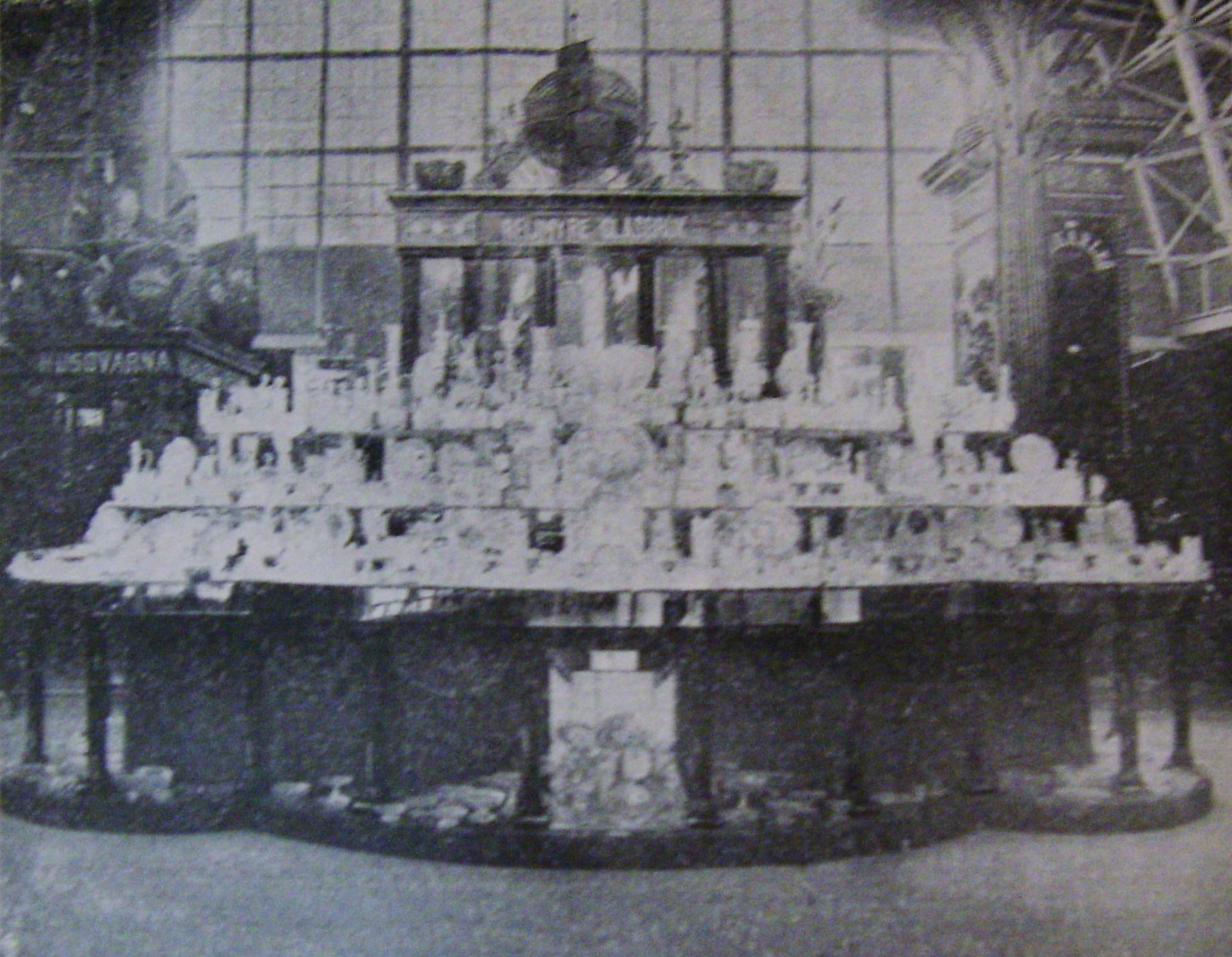 På andra sidan Edamontern och midt emot Kosta har det välkända Reijmyre glasbruk, en af landets allra äldsta anläggningar inom branchen, sin stortartade utställning. Den effektfullt ordnade montern företer en både i kvantitativt och kvalitativt hänseende särdeles representativ uppvisning af hvad bruket kan åstadkomma såväl i prydnadsglas som hushålls- och apoteksglas. Här förekomma utsökt fina pokaler af färgadt glas, slipade i stilfulla mönster, kannor, vaser, bägare o. s. v. af verkligt konstvärde och vittnande om en högt uppdrifven arbetsskicklighet och utgörande ett glädjande bevis på en hand i hand med denna gående formfulländning och smakförfining. Äfven Reijmyrefabrikatet har lifligt slagit an på den köplystna allmänheten, därom vittna de talrika försäljningar, som ägt rum (Hasselgren 1897:270).